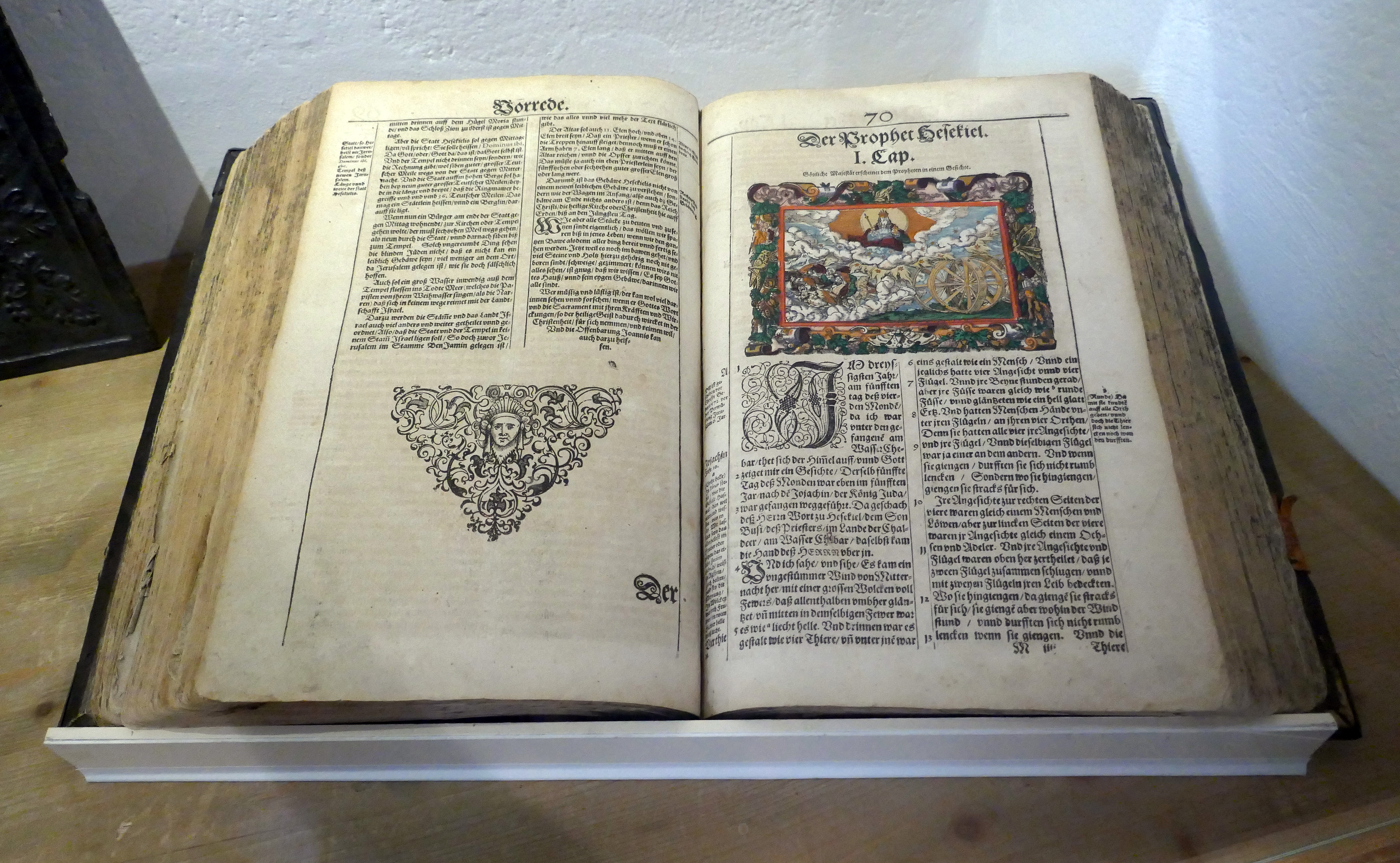 Bible paroissiale illustrée, éditée à Francfort/Main en 1608, utilisée à Spire au XVIIIe siècle. Gravures sur bois colorées à la main. Ici, la majesté divine apparaît au prophète Ezéchiel (1, 1-28). Exposition Vies protestantes : le mot et l'image au Musée alsacien de Strasbourg (2017).